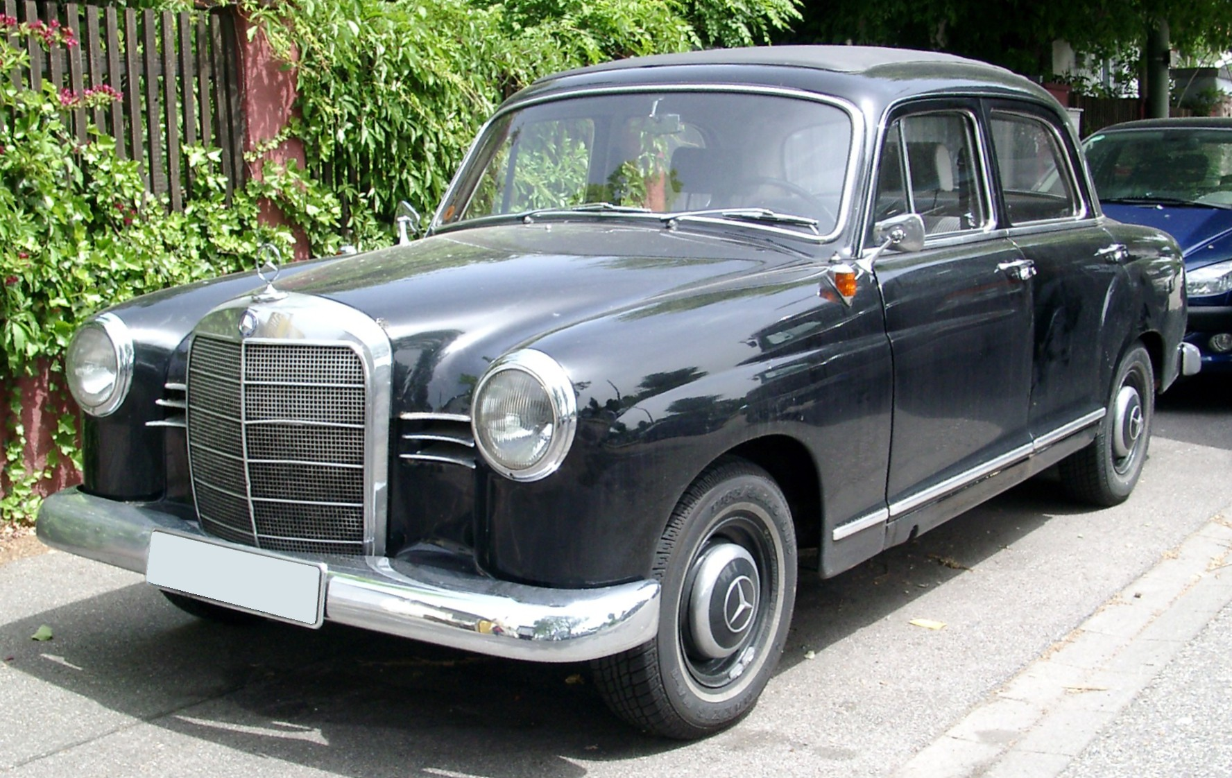 Mercedes-Benz W121